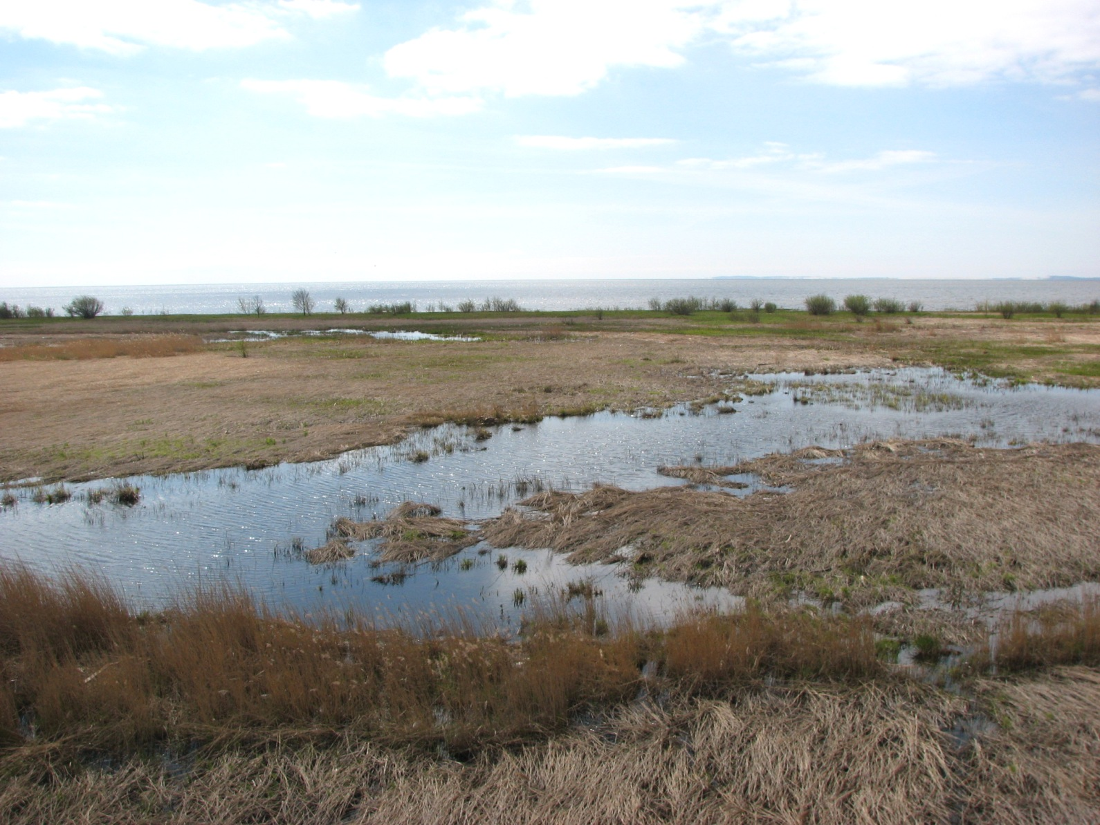 Autoriaus nuotrauka, 2007.05.03. Avandeltos gamtinis rezervatas (tarp Atmatos ir Pakalnės), Rusnės sala. Tolumoje matosi Kuršių nerijos kopos. Nuotrauka gali būti platinama pagal GFDL licenciją.